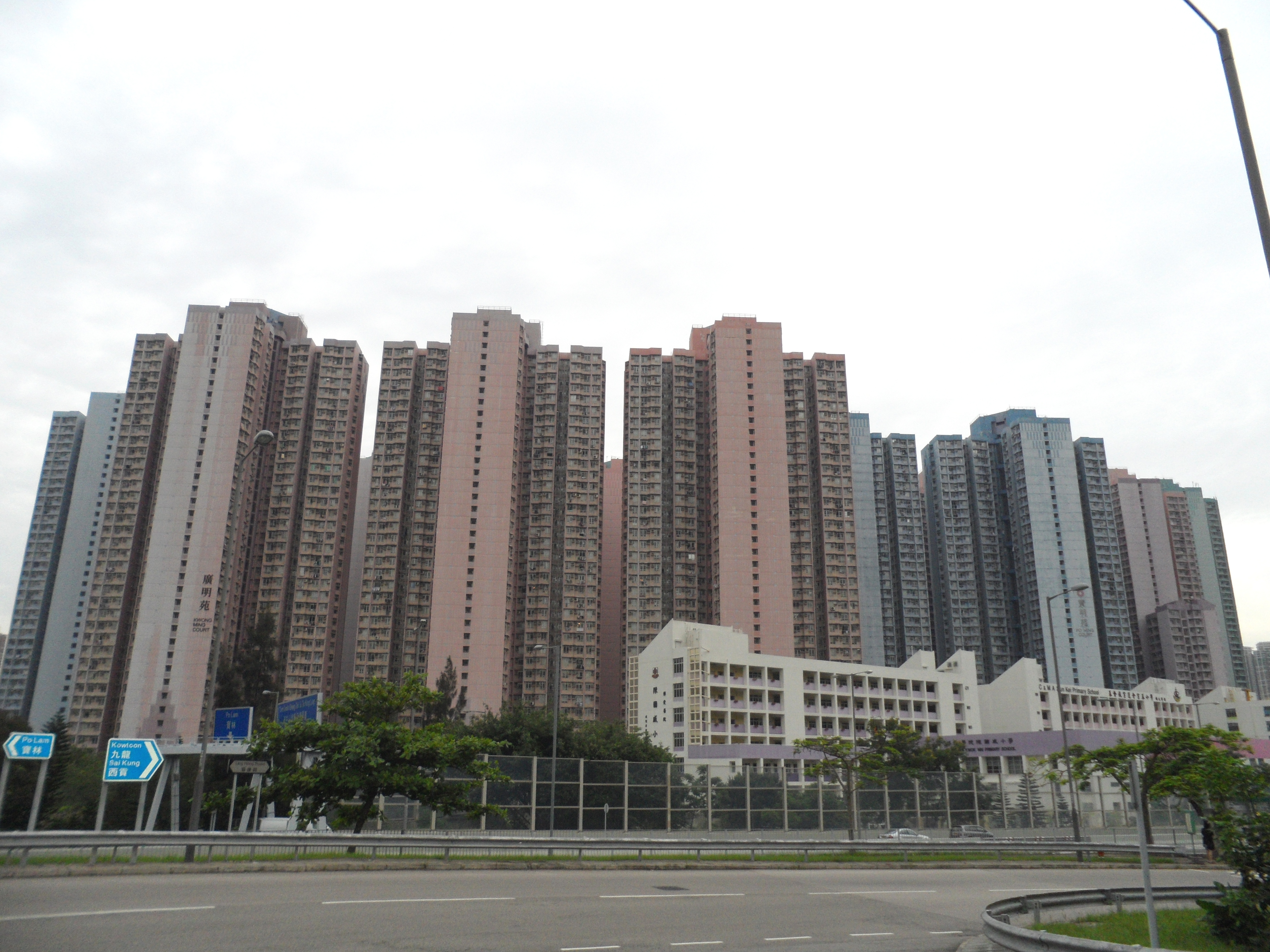 廣明苑、寶明苑 (尚德)